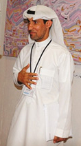 عبد العظيم الضامن في مركز موهبة بالقطيف.